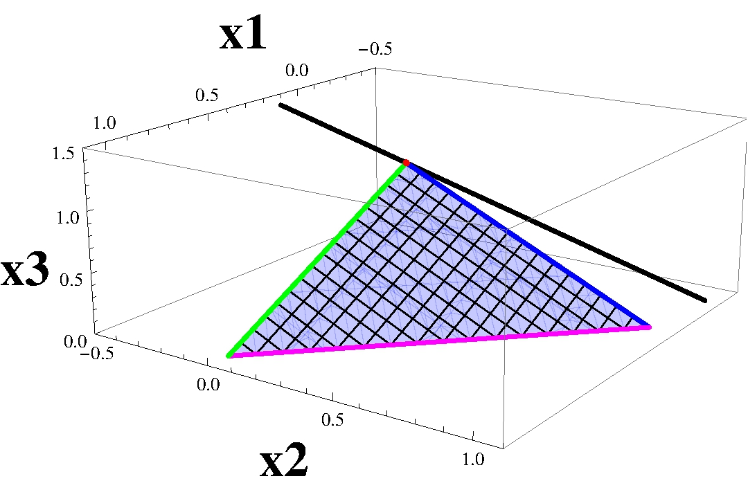 Przykładowy rysunek do modelu Markowitza